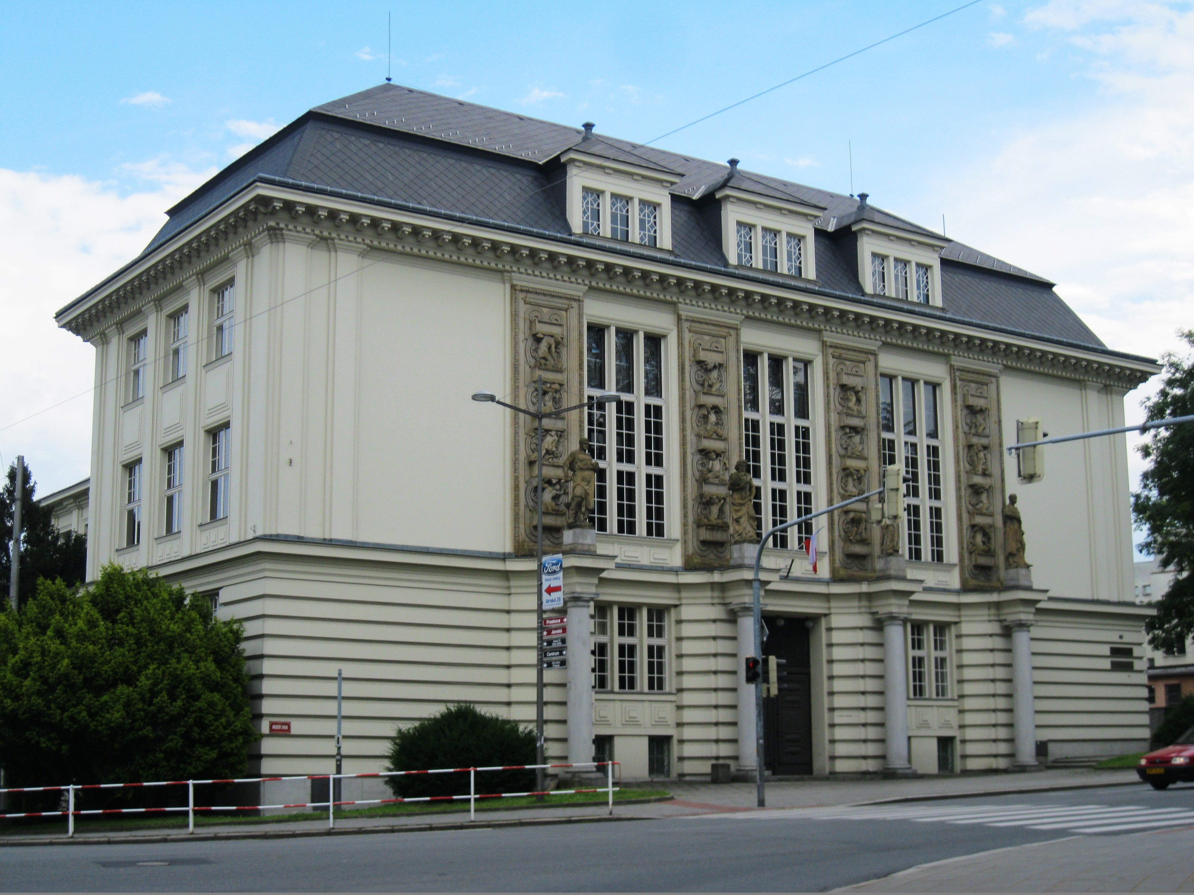 Společenský dům - Městský dům kultury Petra Bezruče (Opava), Nádražní okruh 695/27, Opava